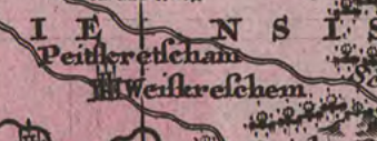 Peiskretscham auf einer Karte um 1740. Eingezeichnet sind die beiden Namen "Peitskretscham" und "Weiskreschem".